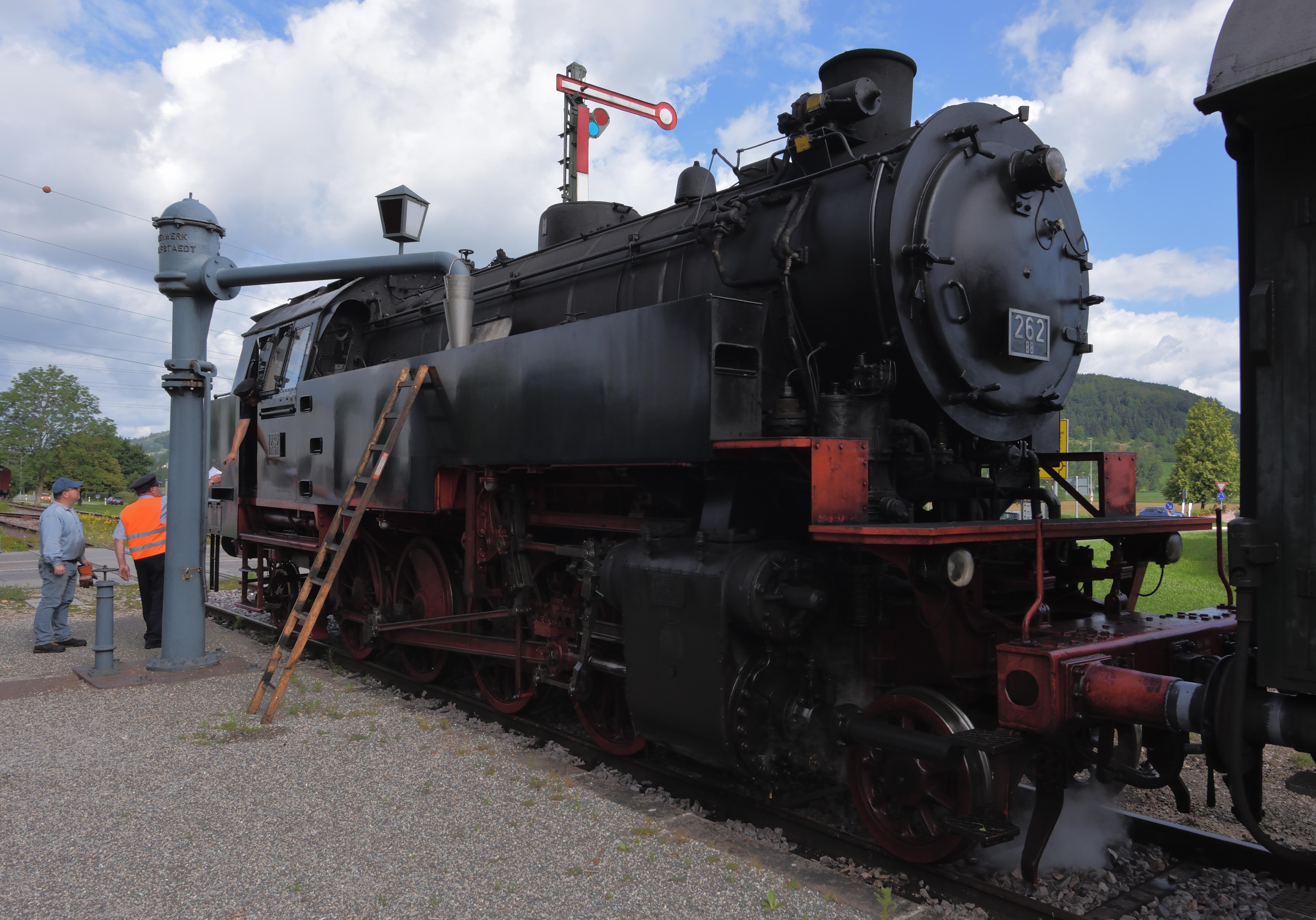 Lok 262 der Sauschwänzlebahn beim Betanken mit Wasser